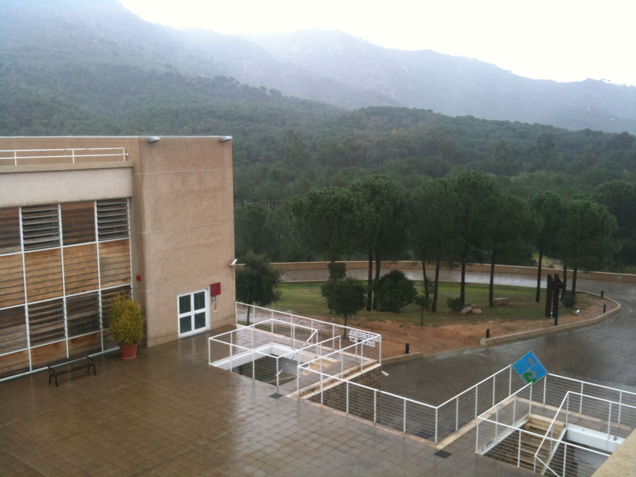 CRS4 (Polaris Science & Tech park, Pula, CA)